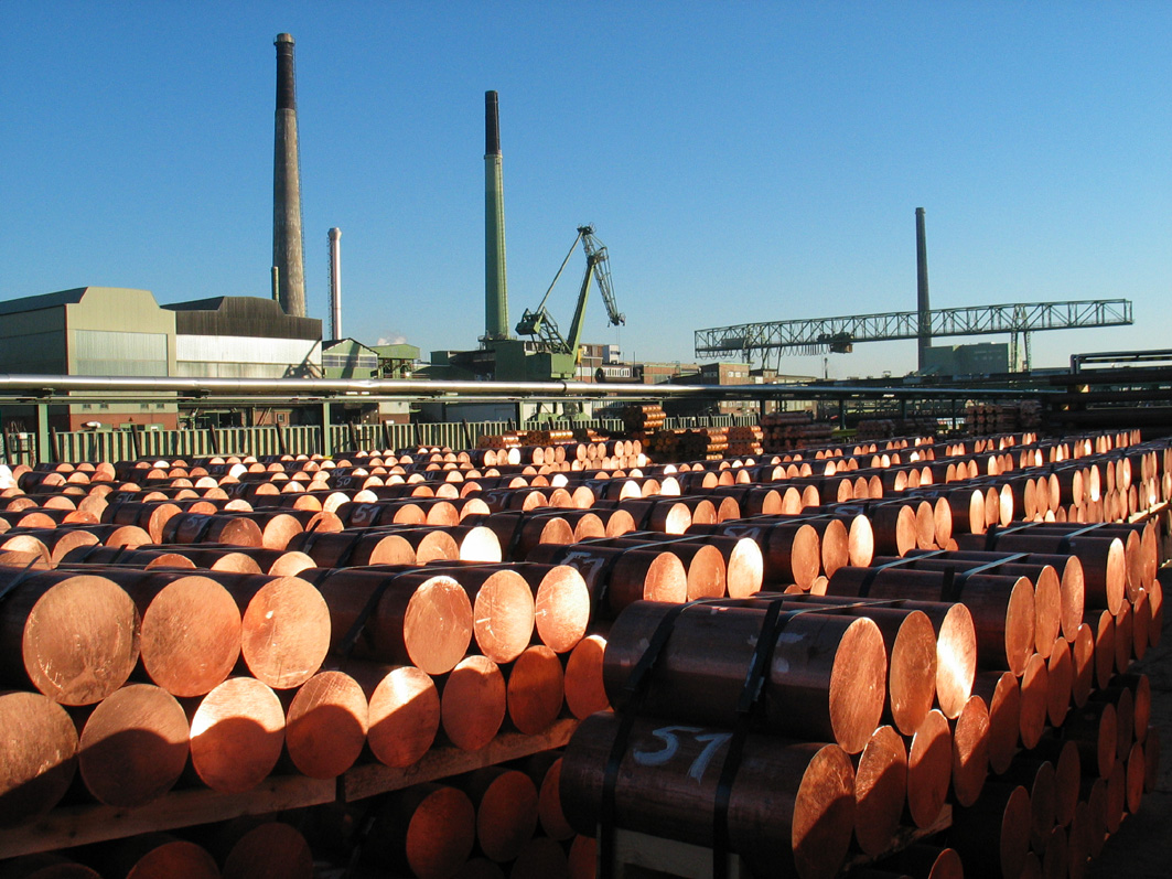 Stranggusslager mit Billets aus Kupfer - Blick auf die Bleianlage